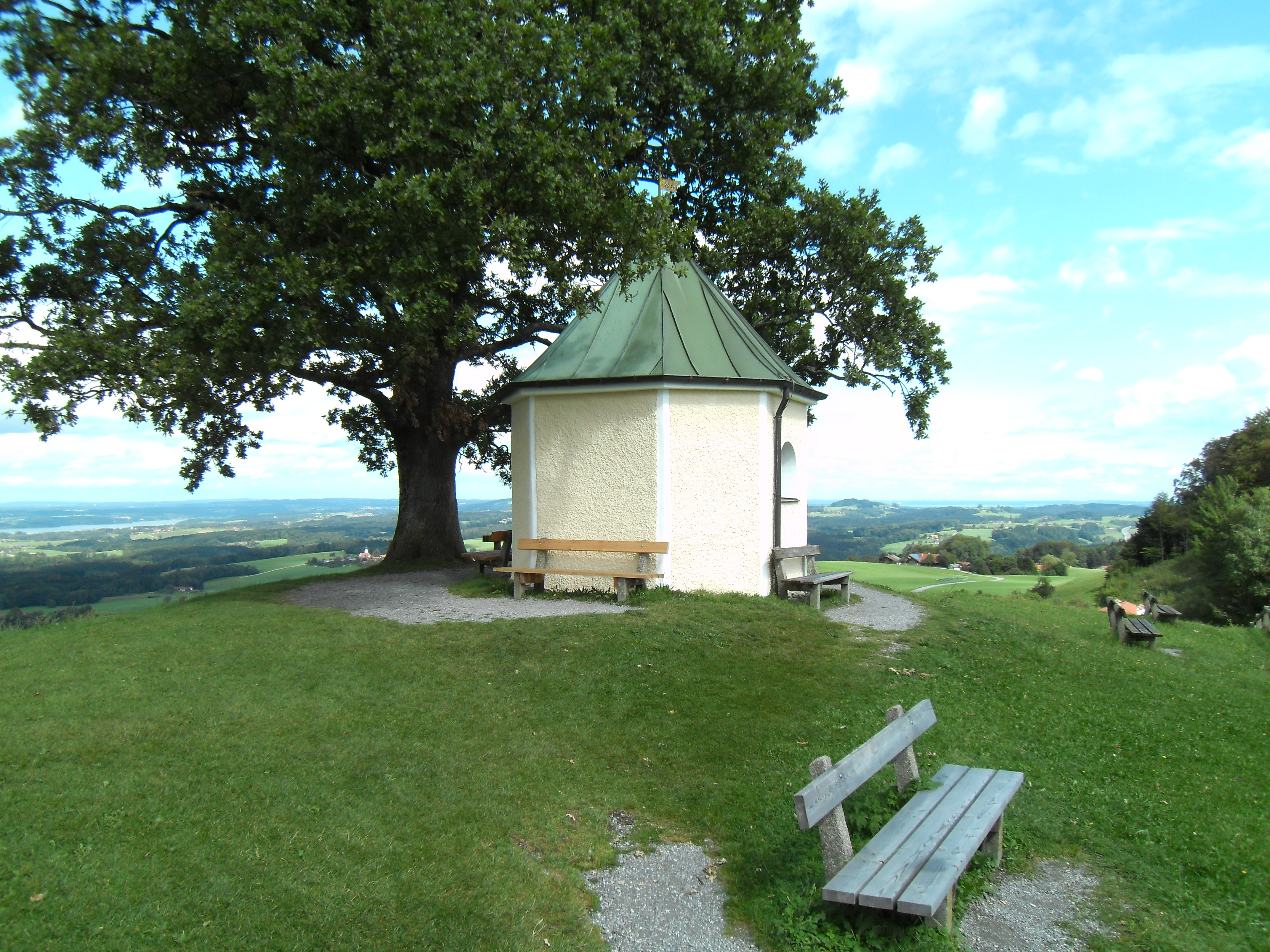 Aussichtskapelle am Obereck bei Törwang (Gemeinde Samerberg, Landkreis Rosenheim, Obb.)